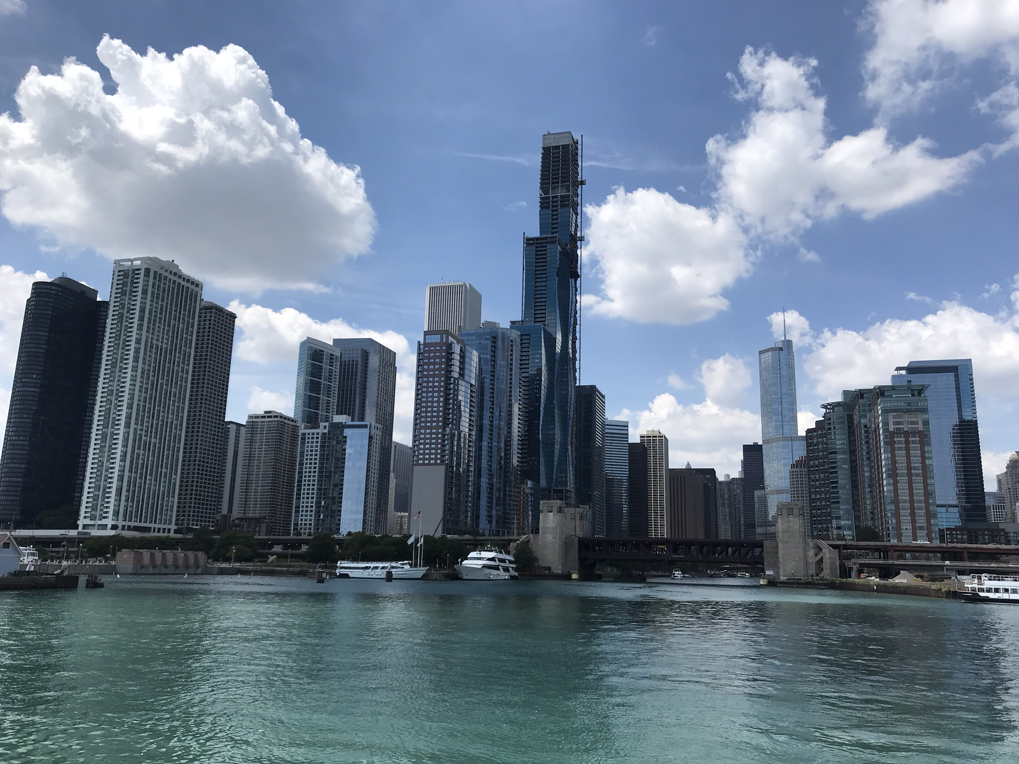 Chicago Wandella Cruise